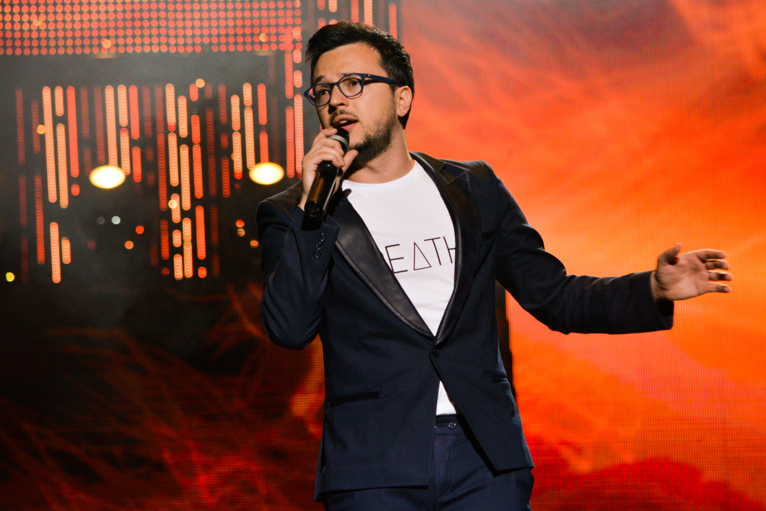 Влатко Лозански на Славянском Базаре 2015